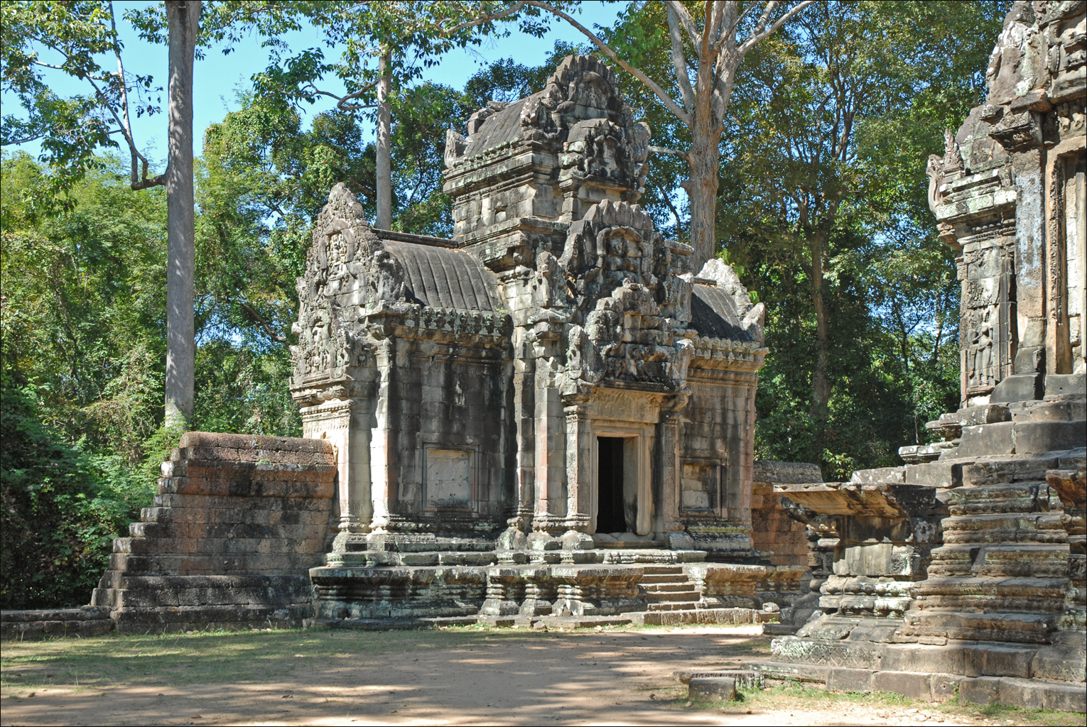 Le gopura occidental du temple Thommanon Ce temple a été construit au début du XIIème siècle, sous le règne de Sûryavarman II. Il est dans le style d'Angkor Vat. Il était dédié au culte hindouiste. Il a été restauré par anastylose, dans les années 60, par B-P. Groslier, un archéologue français. Il comprend une partie centrale composée d'une seule tour-sanctuaire reliée par un passage à une pièce plus grande appelée mandapa. Certains linteaux et frontons sont finement sculptés, les murs sont ornés de gardiens de porte (dvârapâla) et de divinités féminines (devatâ). L'enceinte est percée de deux gopuras donnant à l'est et à l'ouest.